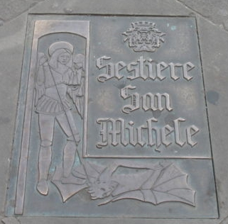 Stemma del Sestiere cittadino di San Michele di Pagana (Rapallo), in provincia di Genova